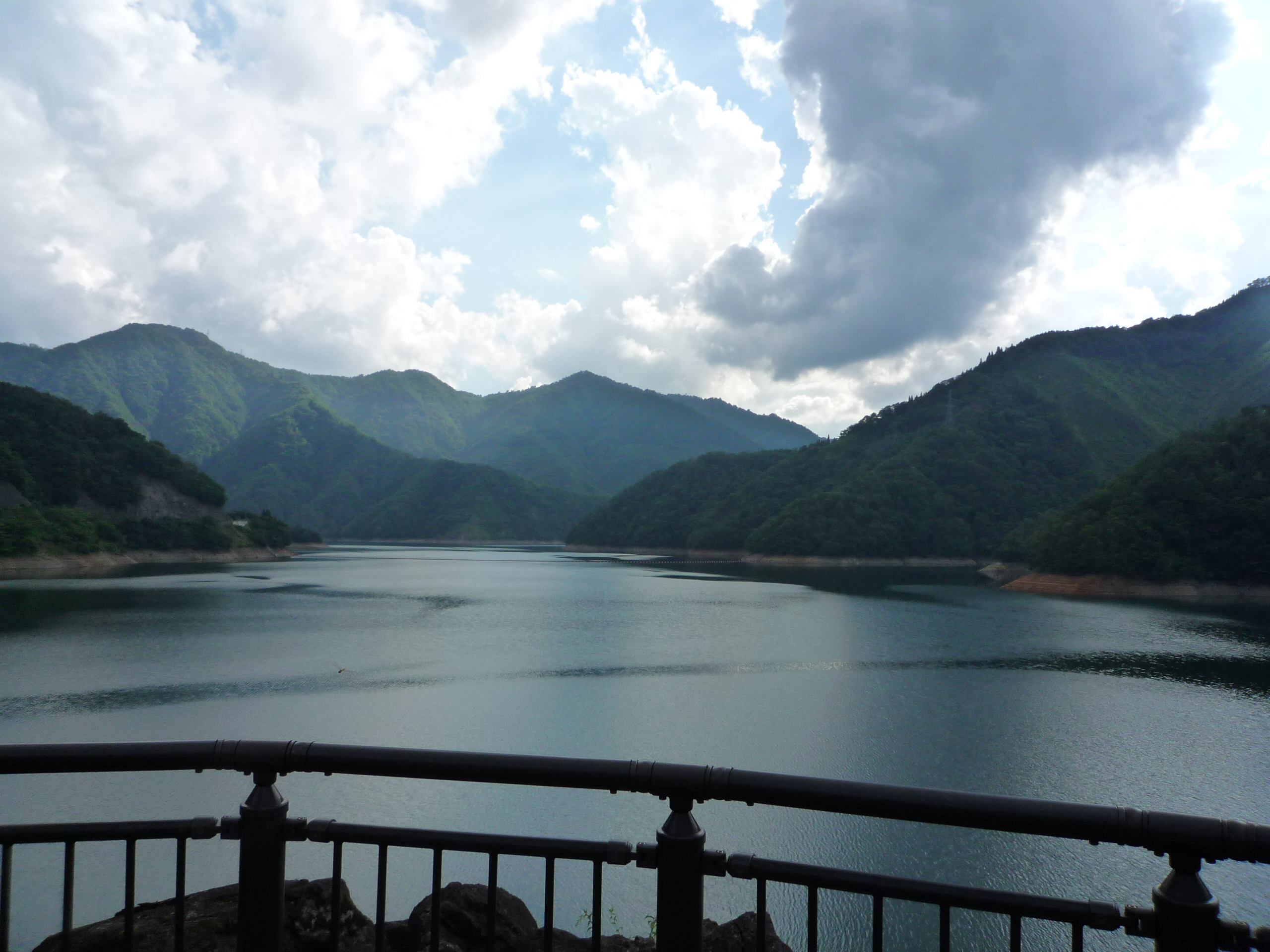 九頭竜ダム